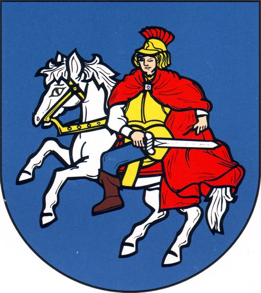 Znak obvodu Martinov.